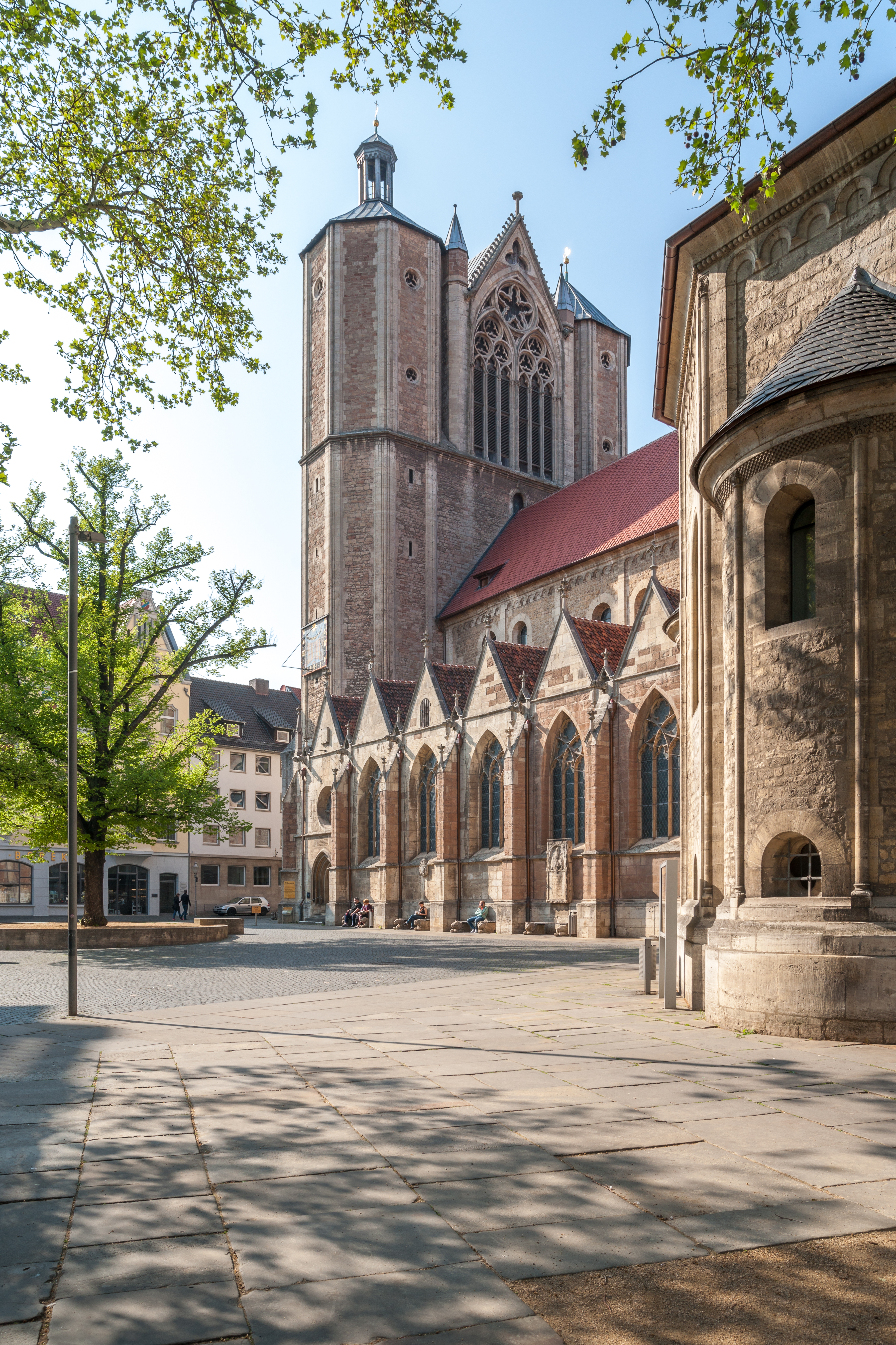 Braunschweiger Dom, Südostansicht, Niedersachsen/Deutschland